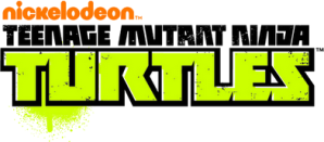 Млади мутанти нинџа корњаче